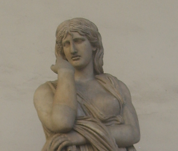 Trauernde Thusnelda